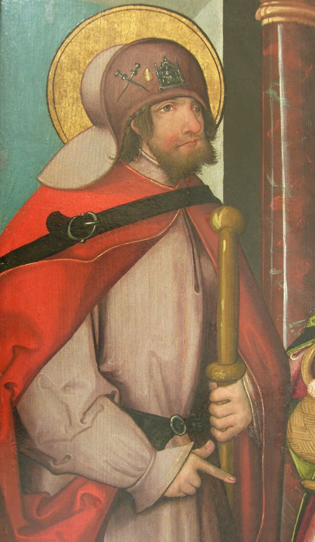 Altargemälde detail: Hl. Jodokus